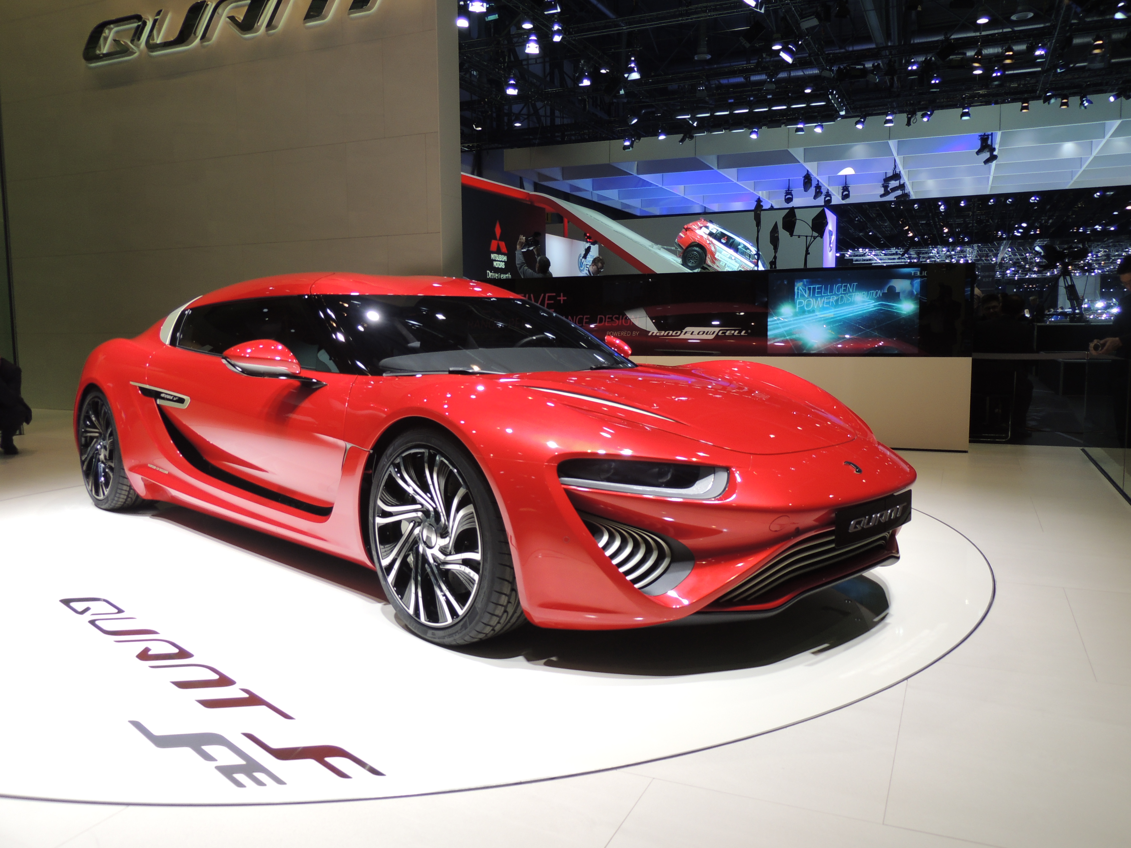 QUANT FE Première mondiale